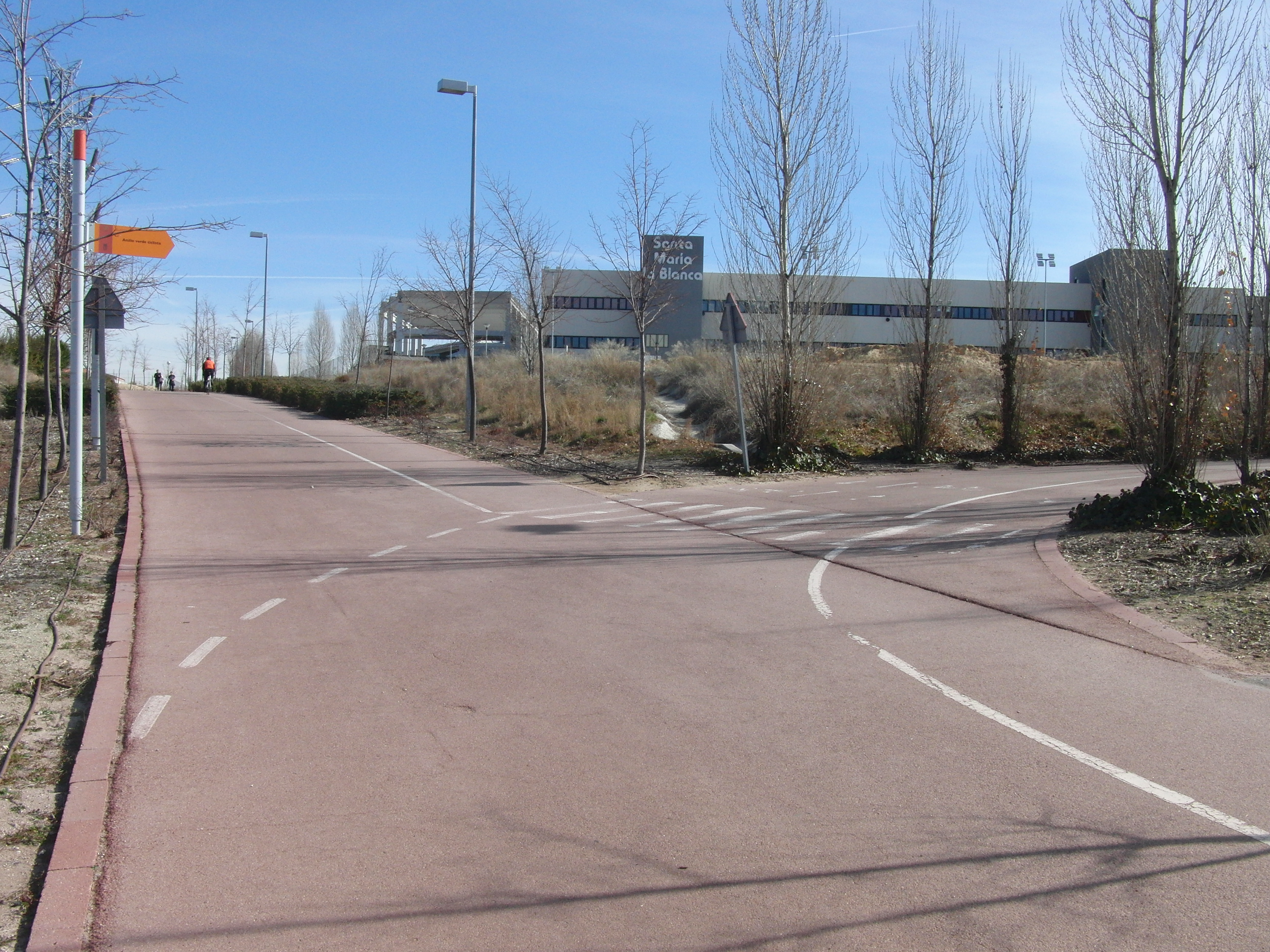 14 Anillo Verde PK 58.9 - 11.37 Bifurcación